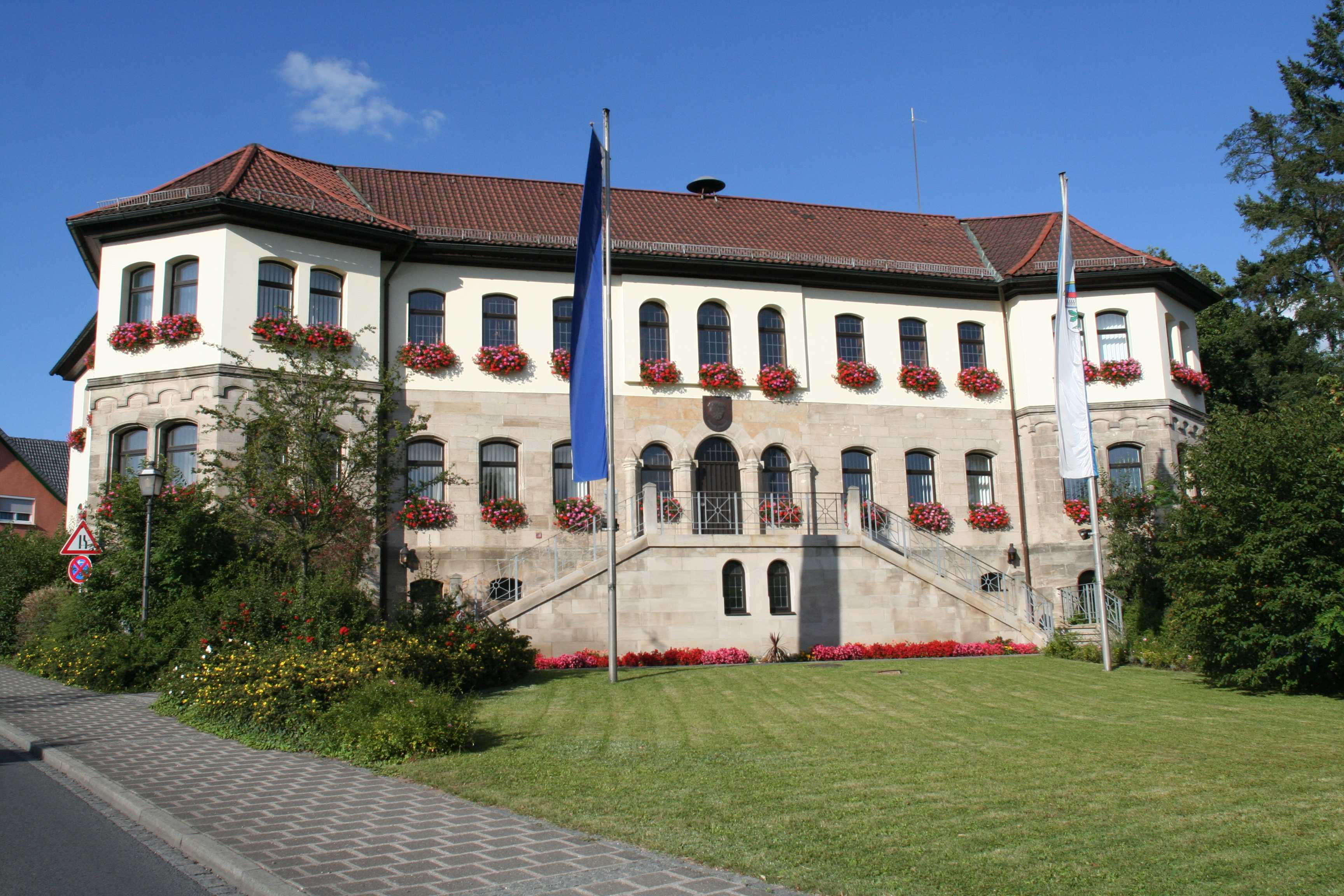 Rathaus Sonnefeld im Landkreis Coburg in Bayern